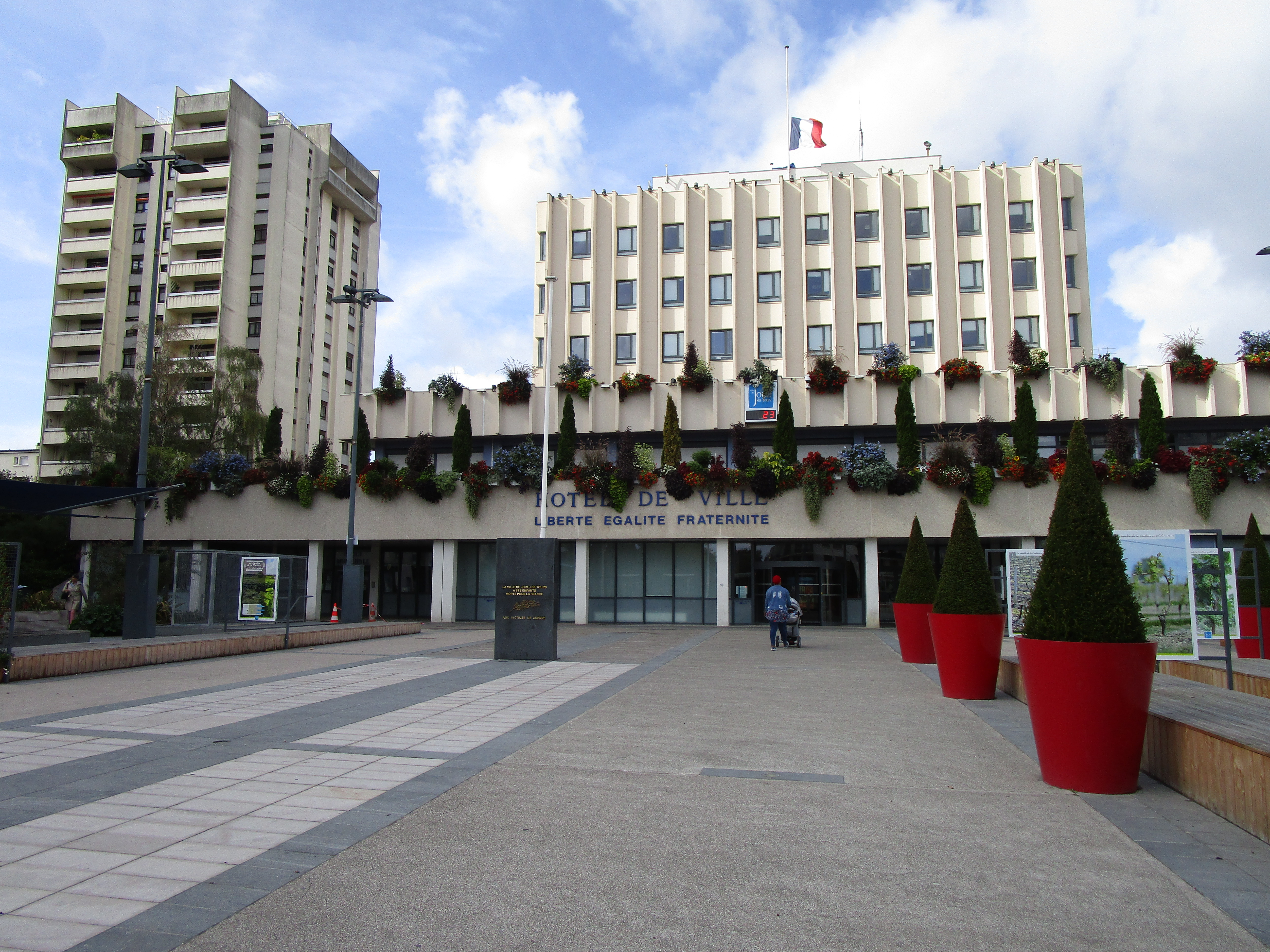 Hotel de ville de Joué-lès-Tours